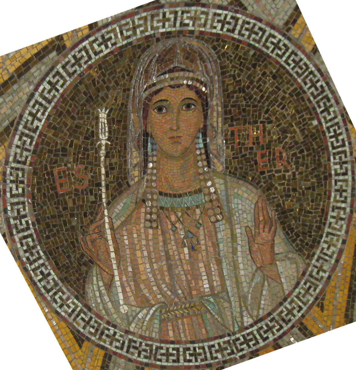 The Dormition Church on Mount Zion in Jerusalem כנסיית הדורמיציון על הר ציון בירושלים